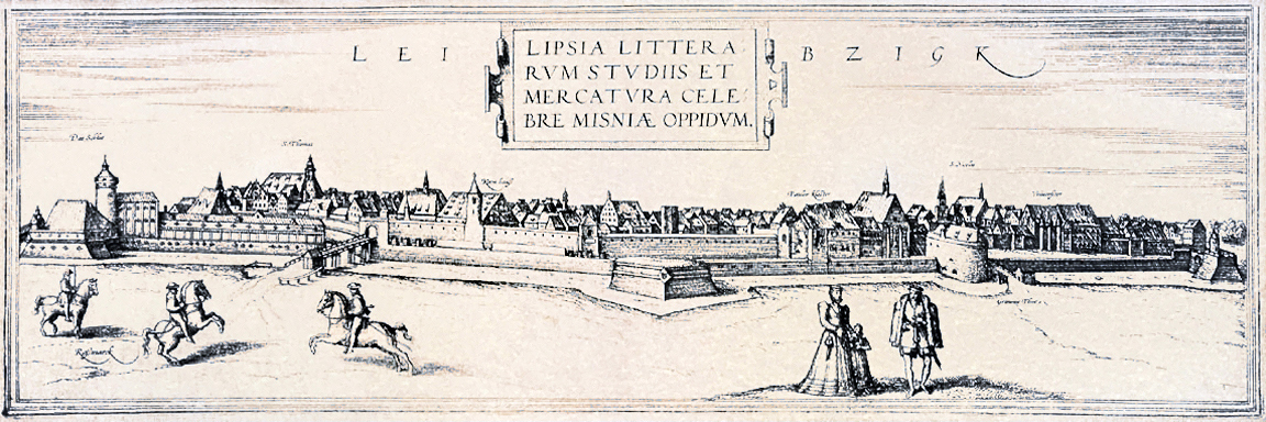 Leipzig um 1580 Kupferstich aus dem Städtebuch von Georg Braun und Franz Hogenberg: Beschreibung und Contrafactur der vornembster Stät der Welt 1574-1618.